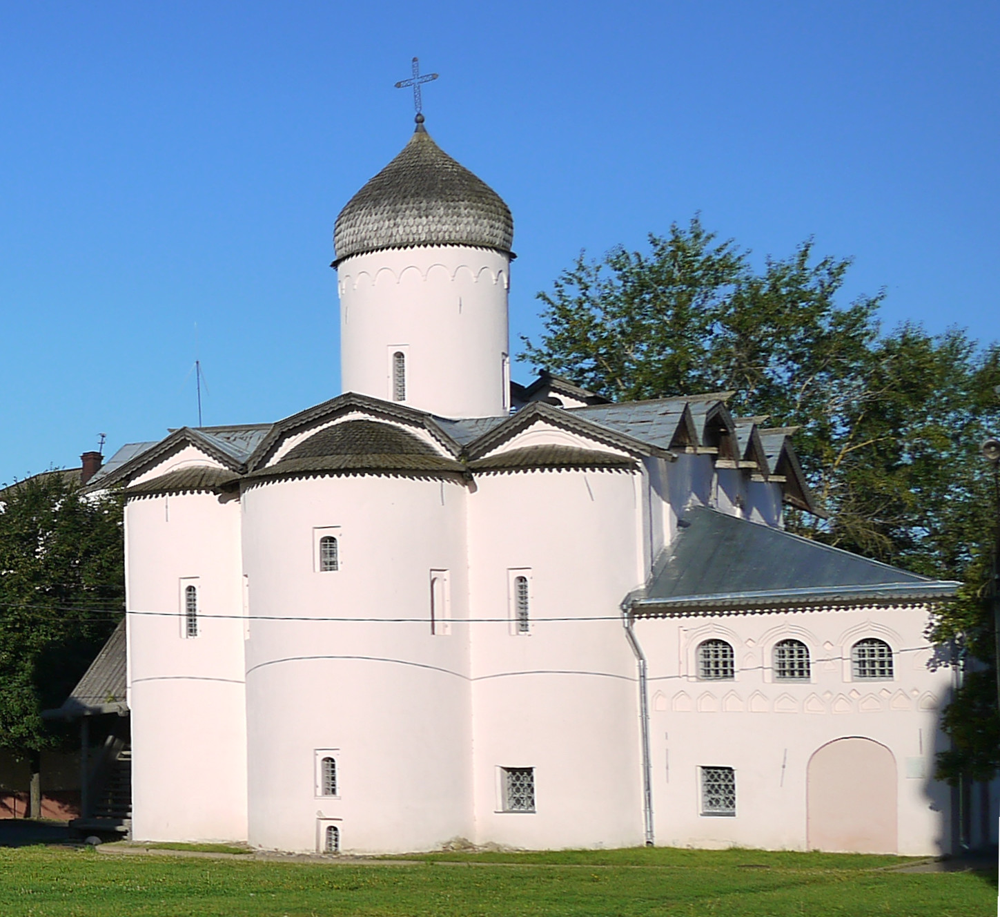 Церковь Жен Мироносиц (Новгородская область, Великий Новгород, Ярославово Дворище)